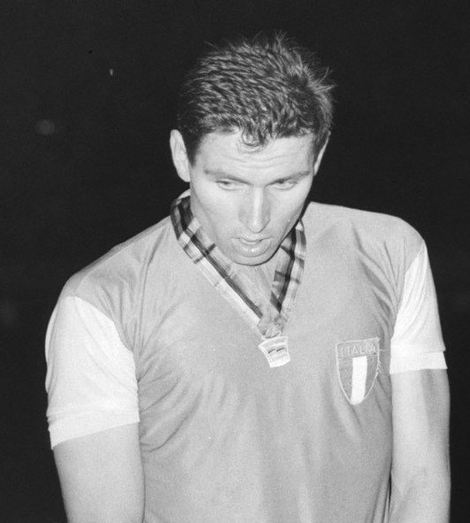 Collectie / Archief : Fotocollectie Anefo Reportage / Serie : [ onbekend ] Beschrijving : Wereldkampioenschappen te Recourt. Sprint amateurs. De Belg Sercu op erepodium Datum : 5 augustus 1963 Trefwoorden : AMATEURS, erepodia, sprinters, wereldkampioenschappen Fotograaf : Pot, Harry / Anefo Auteursrechthebbende : Nationaal Archief Materiaalsoort : Negatief (zwart/wit) Nummer archiefinventaris : bekijk toegang 2.24.01.04 Bestanddeelnummer : 915-4017